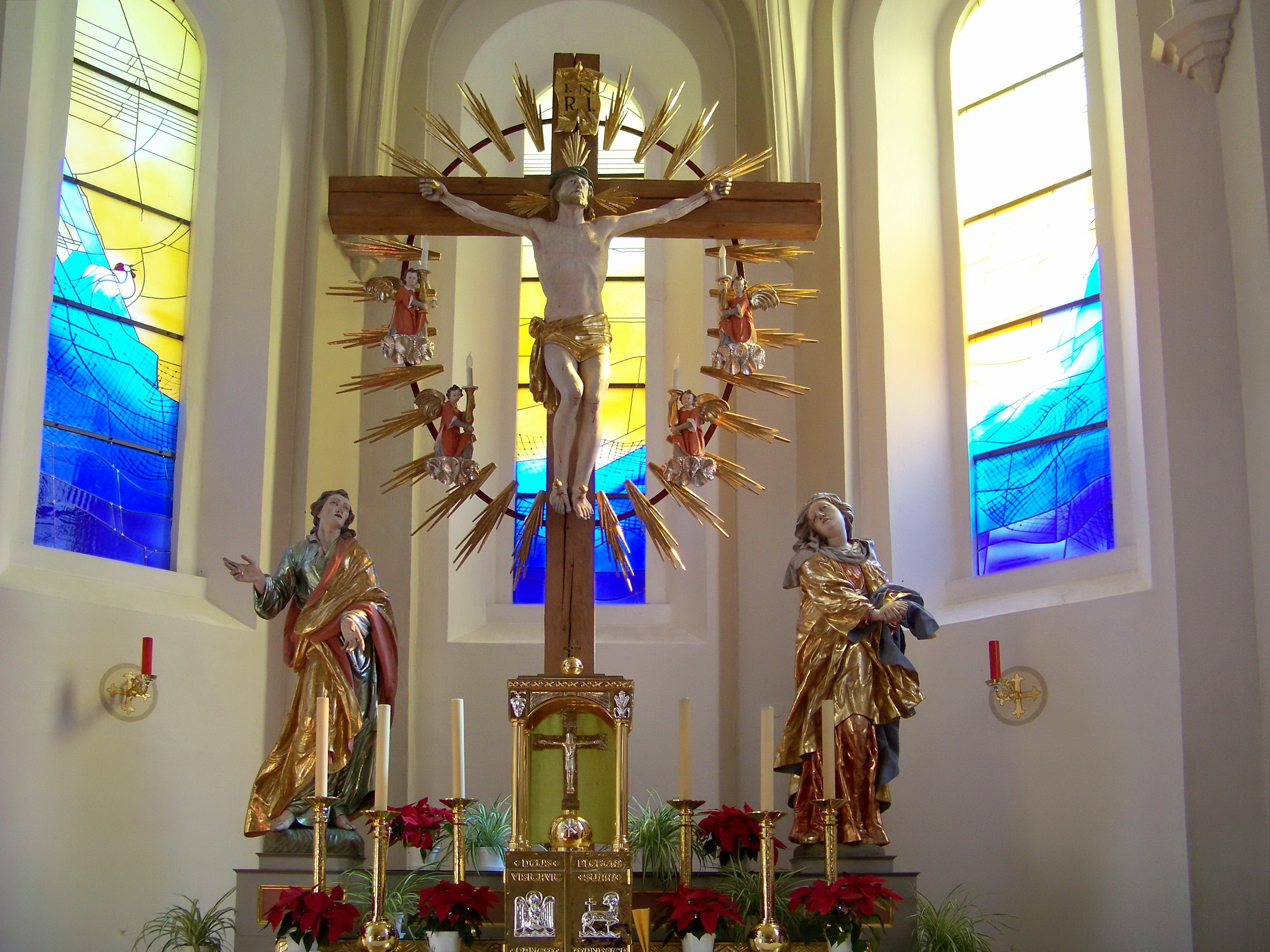 Laberweinting, Hofkirchen 77, katholische Pfarrkirche St. Peter erbaut 1863/64. Der Kreuzaltar wurde 1959 im Rahmen einer umfassenden Kirchenrenovierung anstelle eines neuromanischen Altars aus der Erbauungszeit errichtet. Christus ist von einem ovalen Strahlenkranz mit vier barocken Leuchterengeln umgeben. Der Kreuzbalken wurde von der Zimmerei Roider aus Weichs gefertigt. Der lebensgroße Korpus aus der Mitte des 18. Jahrhunderts stammt aus der 1935 abgebrochenen Kirche Mariä Himmelfahrt in Neufahrn (Niederbayern), da er stilistisch und räumlich nicht in den Neubau von 1938 passte. Die Seitenfiguren Johannes und Maria wurden 1959 im Rahmen der Kirchenrenovierung mit weiteren älteren aber restaurierten Figuren zugekauft. Über das Entstehungsjahr der sicherlich älteren Figuren oder deren früheren Standort konnte nichts mehr in Erfahrung gebracht werden. Unterlagen sind nicht vorhanden. Der damalige Pfarrer J. K. ließ keine Kirchenrechnung führen, sondern sammelte von Haus zu Haus in der gesamten Pfarrei und bezahlte alle Anschaffungen und Arbeitslöhne aus einer Zigarrenkiste in bar. Die drei farbigen Kirchenfenster, die im Hintergrund zu sehen sind wurden 2006 von der Malerin Ruthild Langhammer entworfen und gestaltet. Das Thema des Triptychons ist der Kirchenpatron St. Petrus ist. Alle drei Fenster werden von einem Fischernetz durchzogen. Jesus sagte zum Fischer Petrus, dass er künftig Menschen fischen werde. Das linke Fenster zeigt einen Hahn, das Zeichen des Verrats. Jesus sagte zu Petrus, dass er ihn dreimal verleugnen werde, bevor der Hahn kräht. Im rechten Fenster sieht man einen Felsen mit einer Kirche. Jesus sagte, du bist Petrus der Fels. Auf diesem Felsen will ich meine Kirche bauen. Das Attiribut, die gekreuzten Schlüssel wurden vom Kunstausschuss der Diözese unverständlicherweise gestrichen. Das mittlere Fenster wird größtenteils vom Kreuz verdeckt und hat deshalb keine Symbole. Die Farbe wechselt vom Blau des Wassers hin zum zum Gelb des Lichtes.